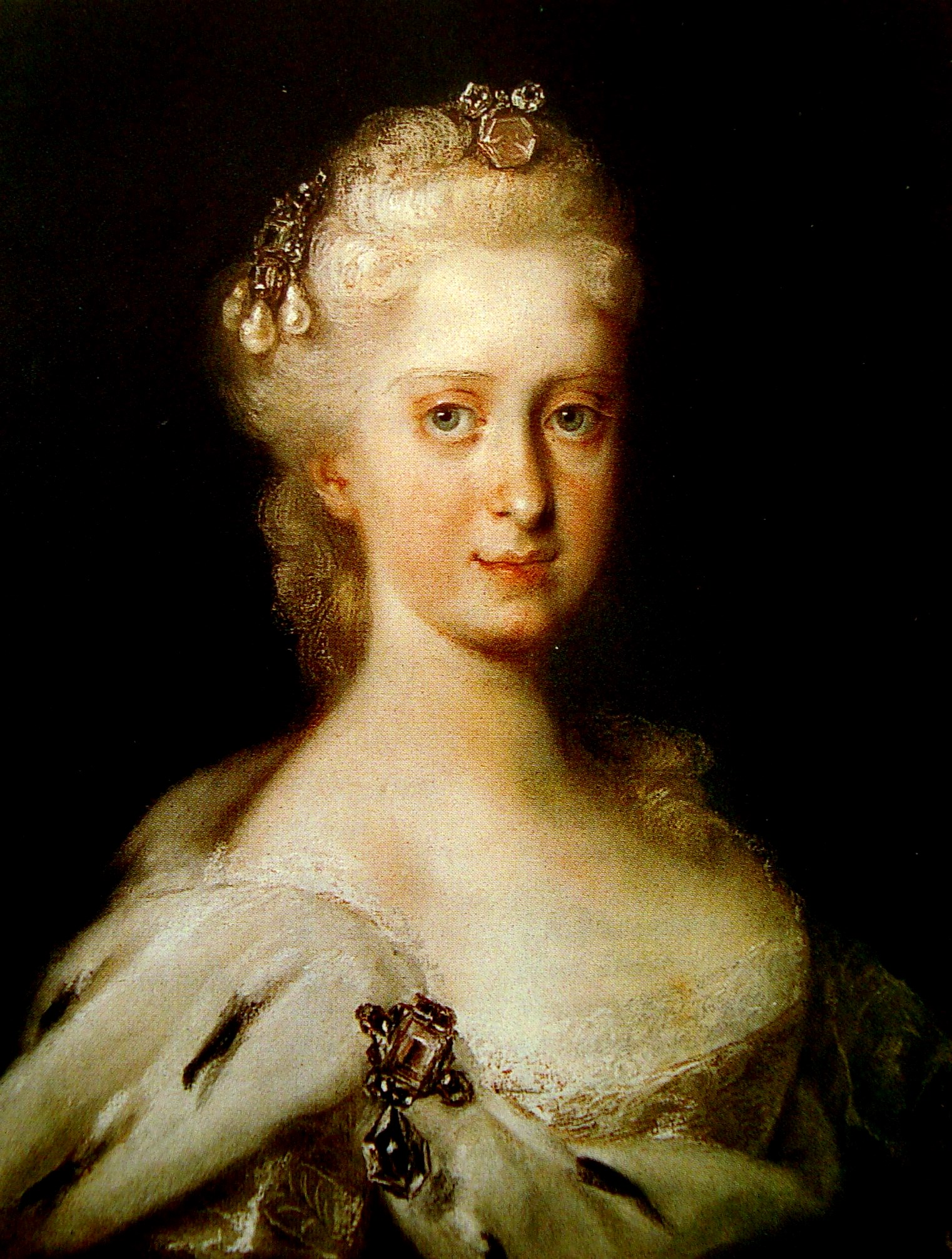 Portrait of Maria Josepha of Austria (1699-1757)label QS:Lde,"Maria Josepha(1799-1757), Erzherzögin vom Kaiserreich Österreich (Kaisertochter), Königin von Polen, damit Großherzogin vom Großherzogtum Litauen, Kürfürstin von Sachsen"label QS:Len,"Portrait of Maria Josepha of Austria (1699-1757)"label QS:Lpl,"Maria Józefa Habsburżanka (1799-1757), królowa Polski, żona króla polskiego i elektora saskiego Augusta III Sasa."